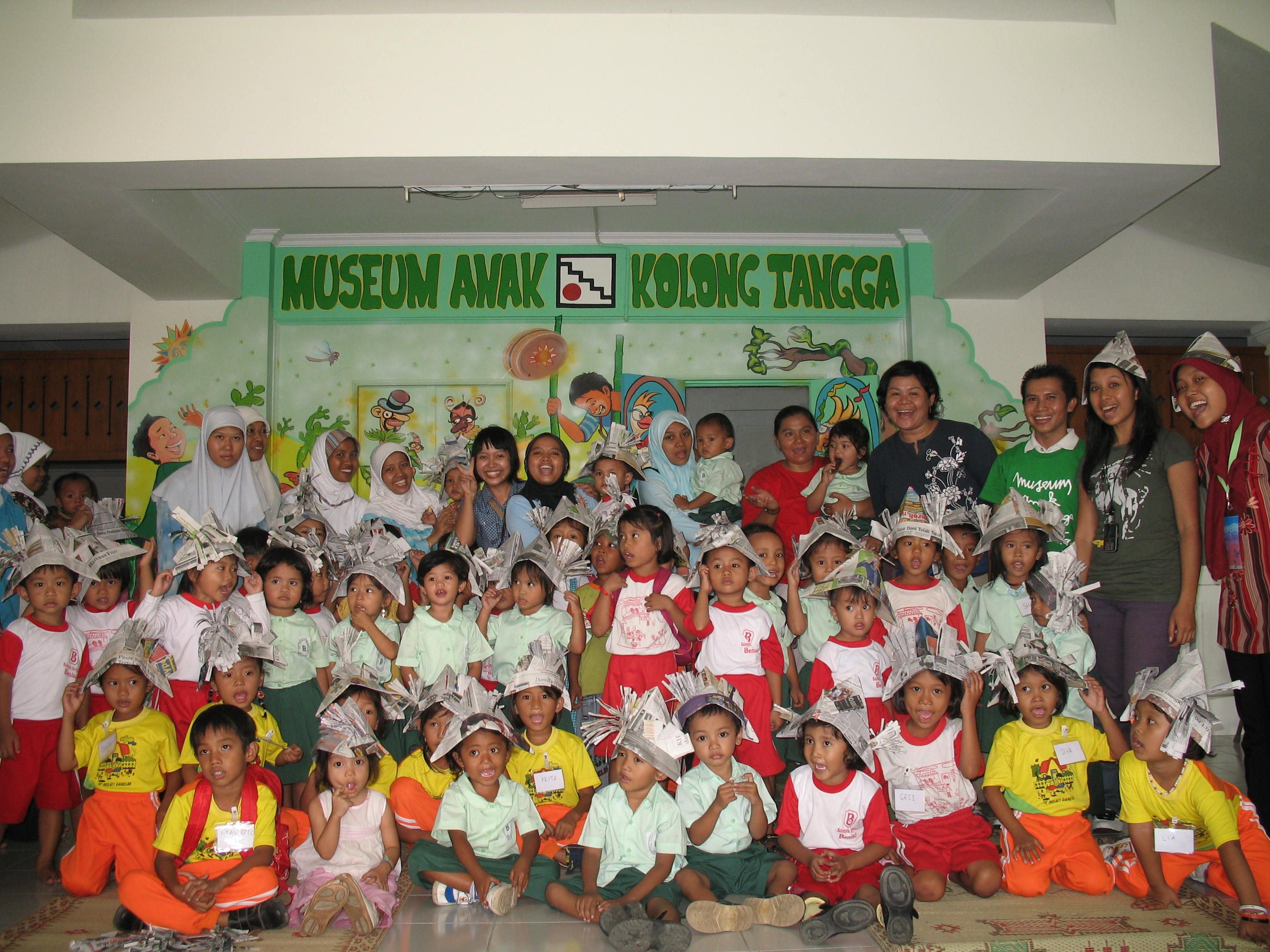 Kunjungan Sekolah ke Museum Kolong Tangga